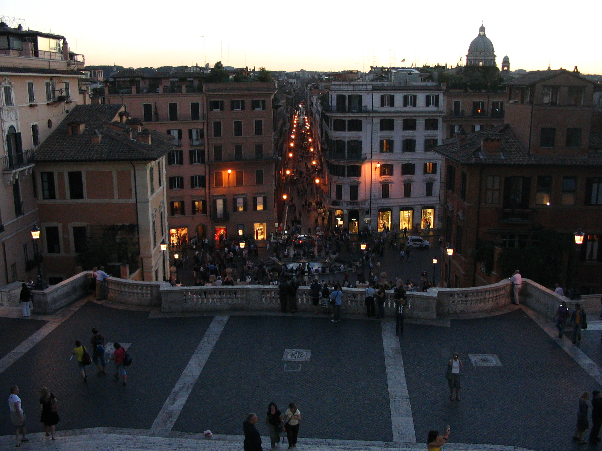 Upside Spanish Steps(Rome)//Oberhalb der Spanischen Treppe(Rom)